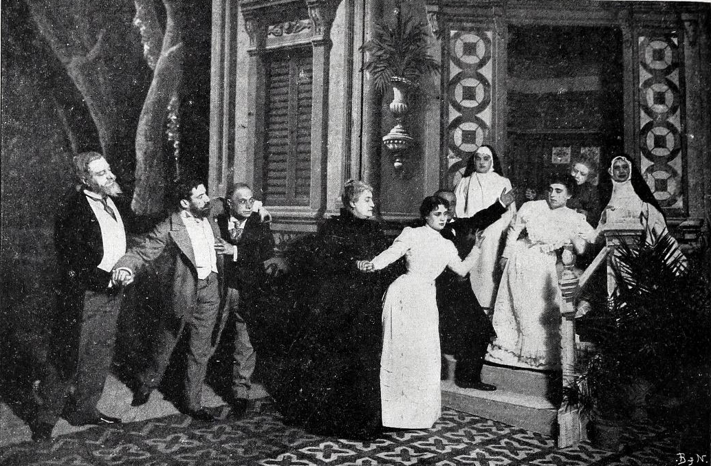 Electra, acto cuarto.